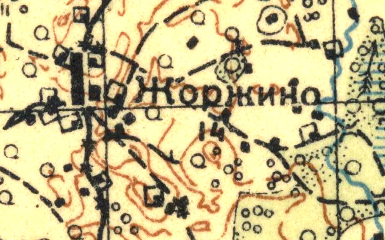 Топографическая карта Ленинградской области, квадрат О-36-15-А (Шапки), деревня Жоржино